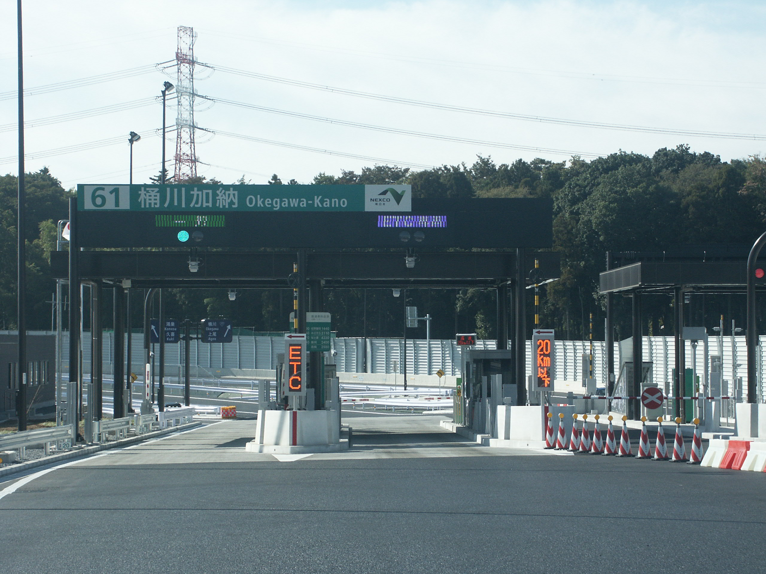 首都圏中央連絡自動車道桶川加納インターチェンジ出口側料金所